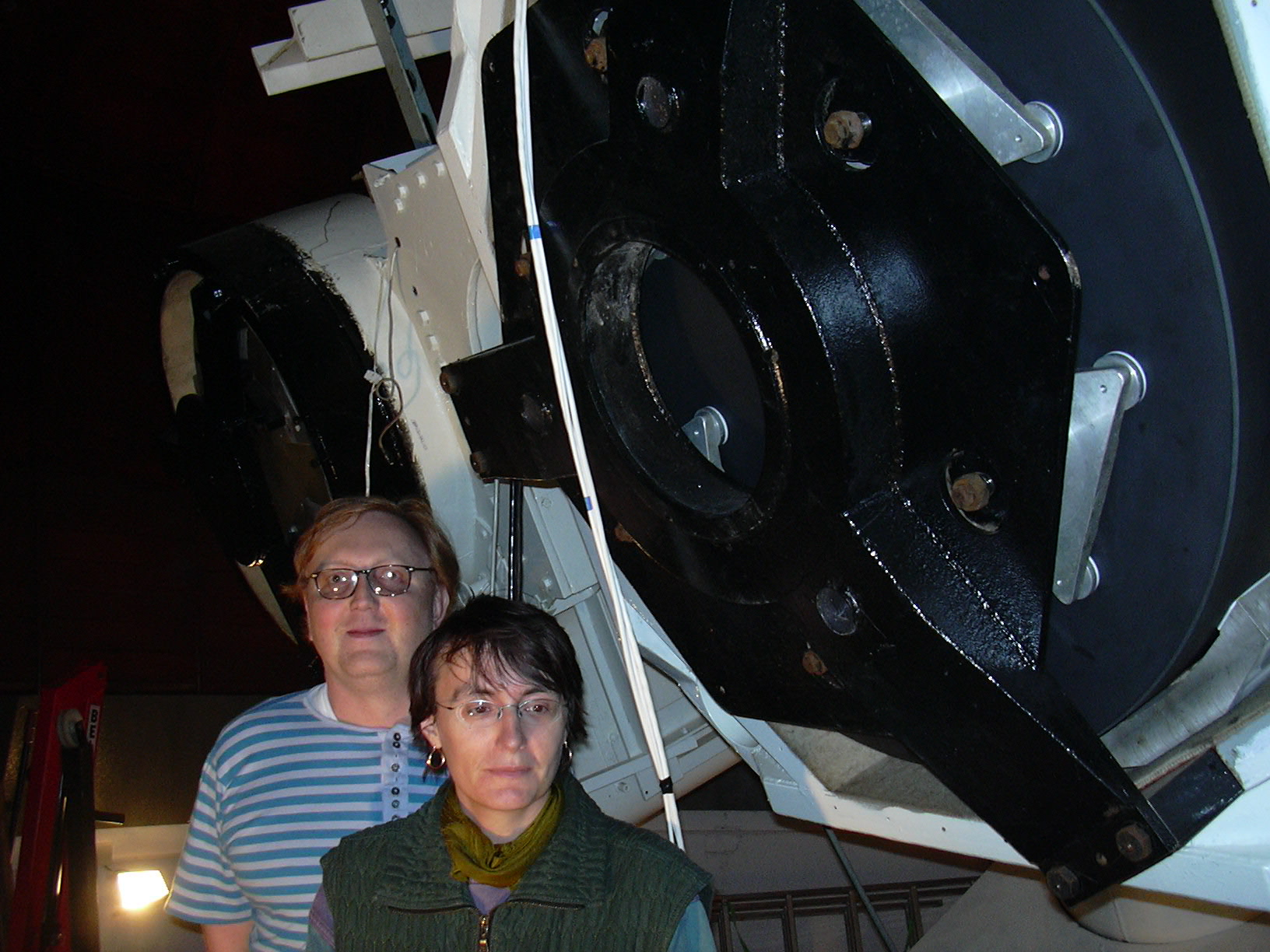 Jana Tichá, Miloš Tichý and KLENOT at Kleť Observatory, Czechia